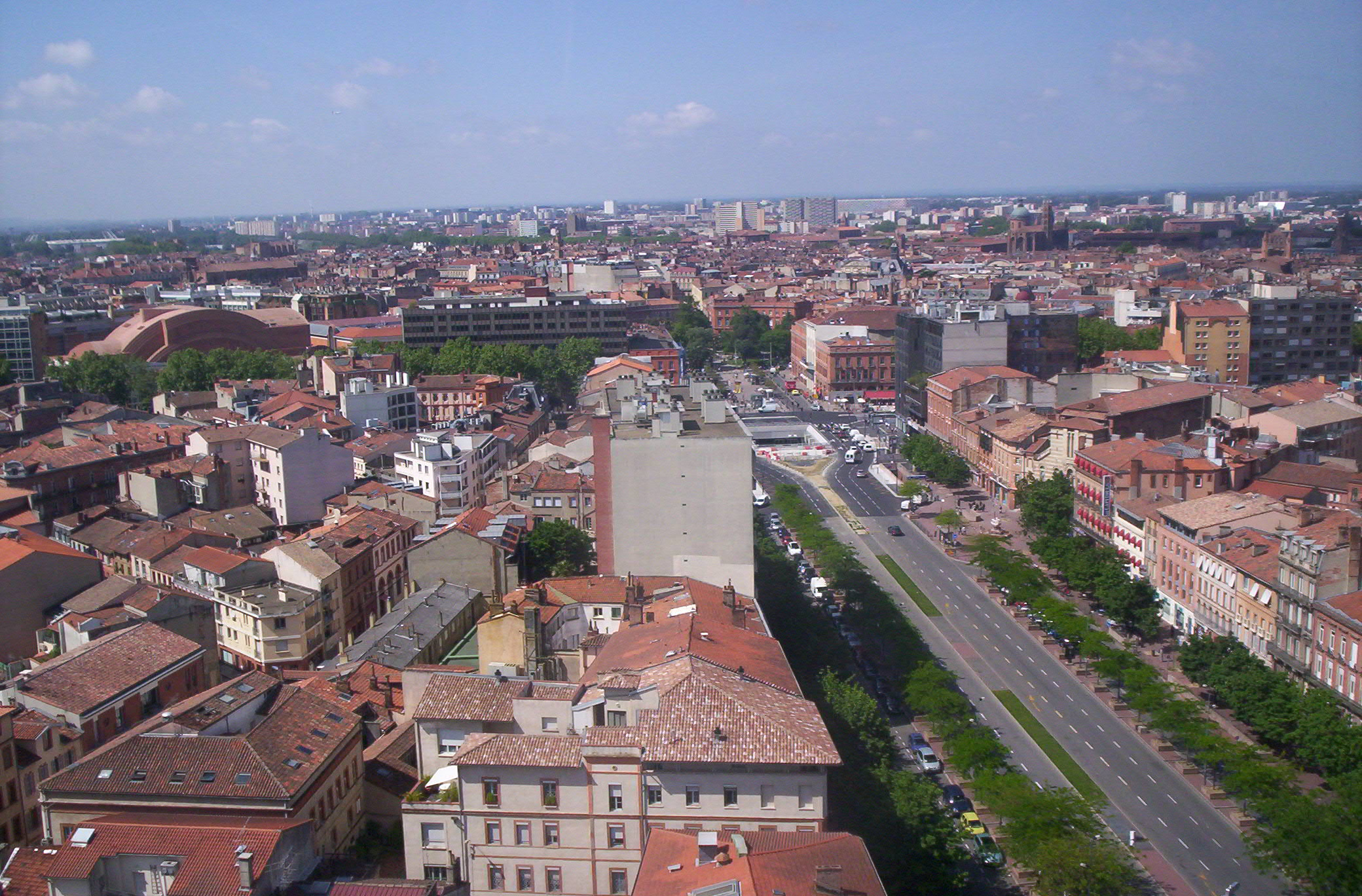 Vue de Toulouse depuis un immeuble de l'Allée Jean Jaurès.